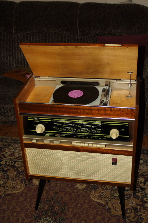 Радиола "Ригонда" 1969 года выпуска.